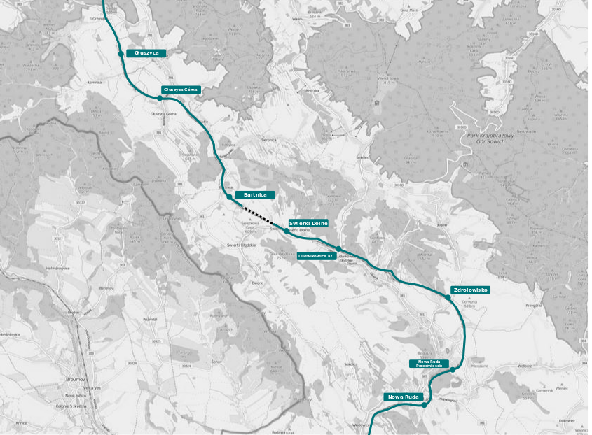 Schemat przebiegu linii kolejowej Kłodzko-Wałbrzych